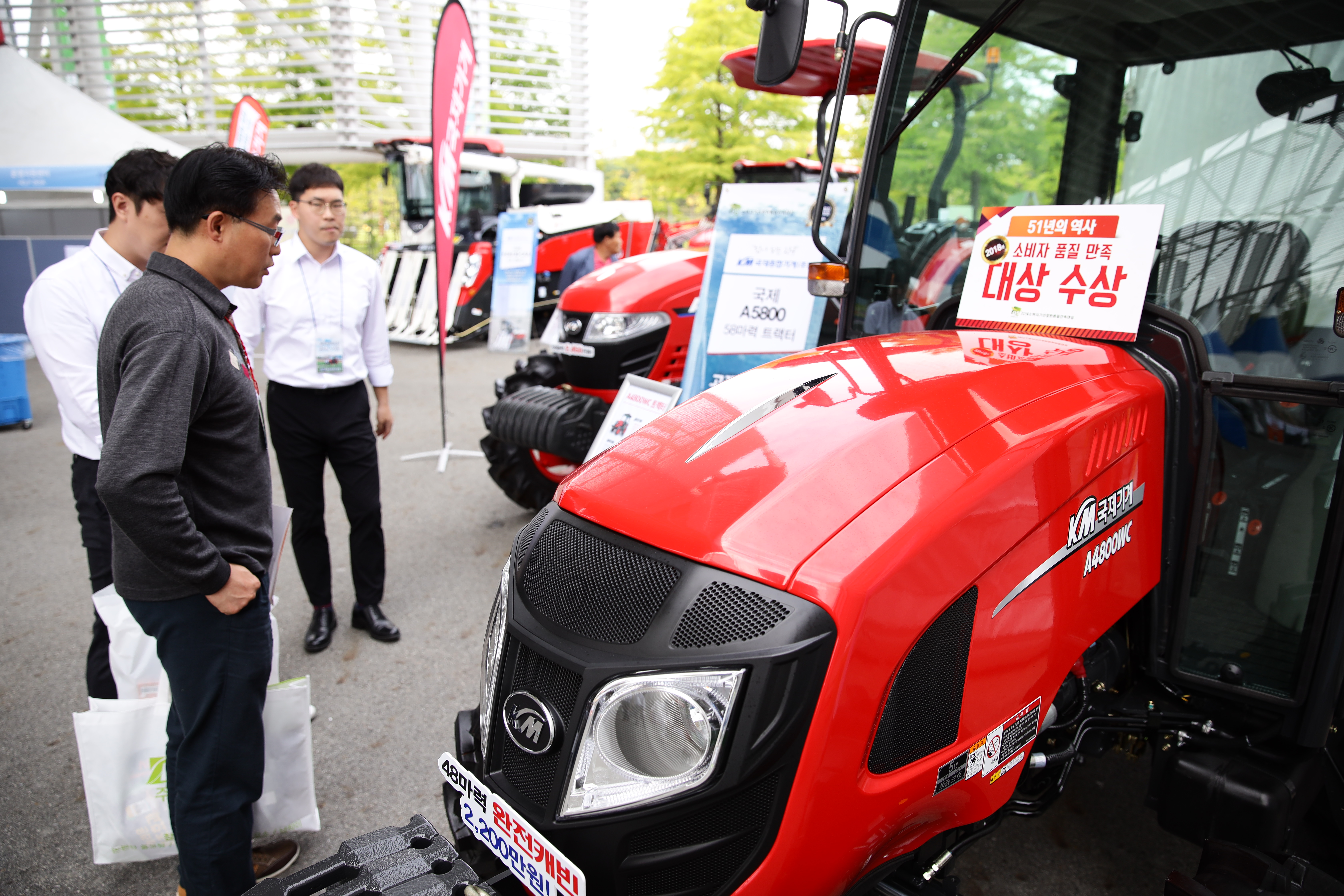 TAMAS 2019 행사장 부스